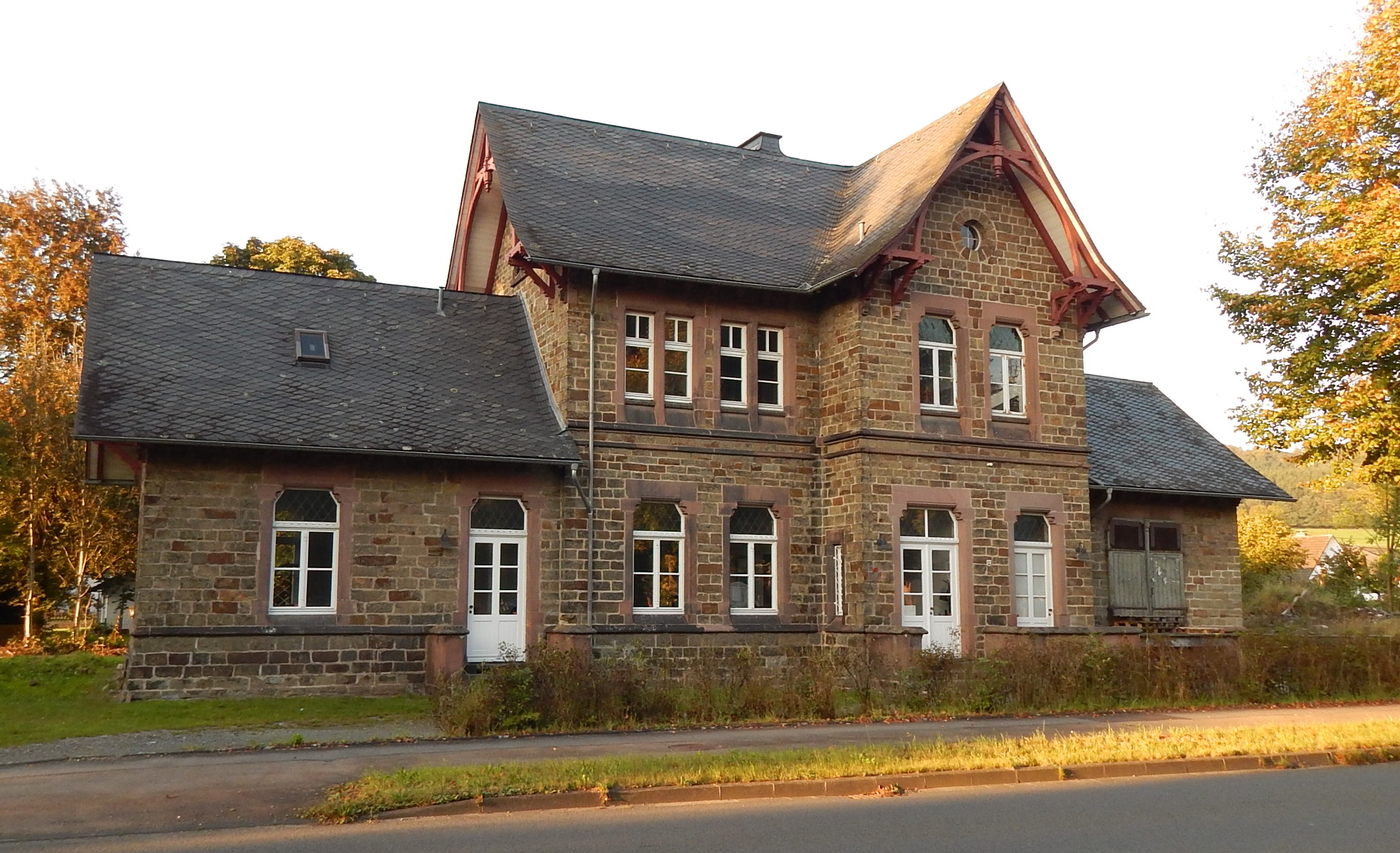 Altes Bahnhofsgebäude in Engelskirchen-Loope, Ehreshoven 12-14 This is a photograph of an architectural monument.It is on the list of cultural monuments of Engelskirchen